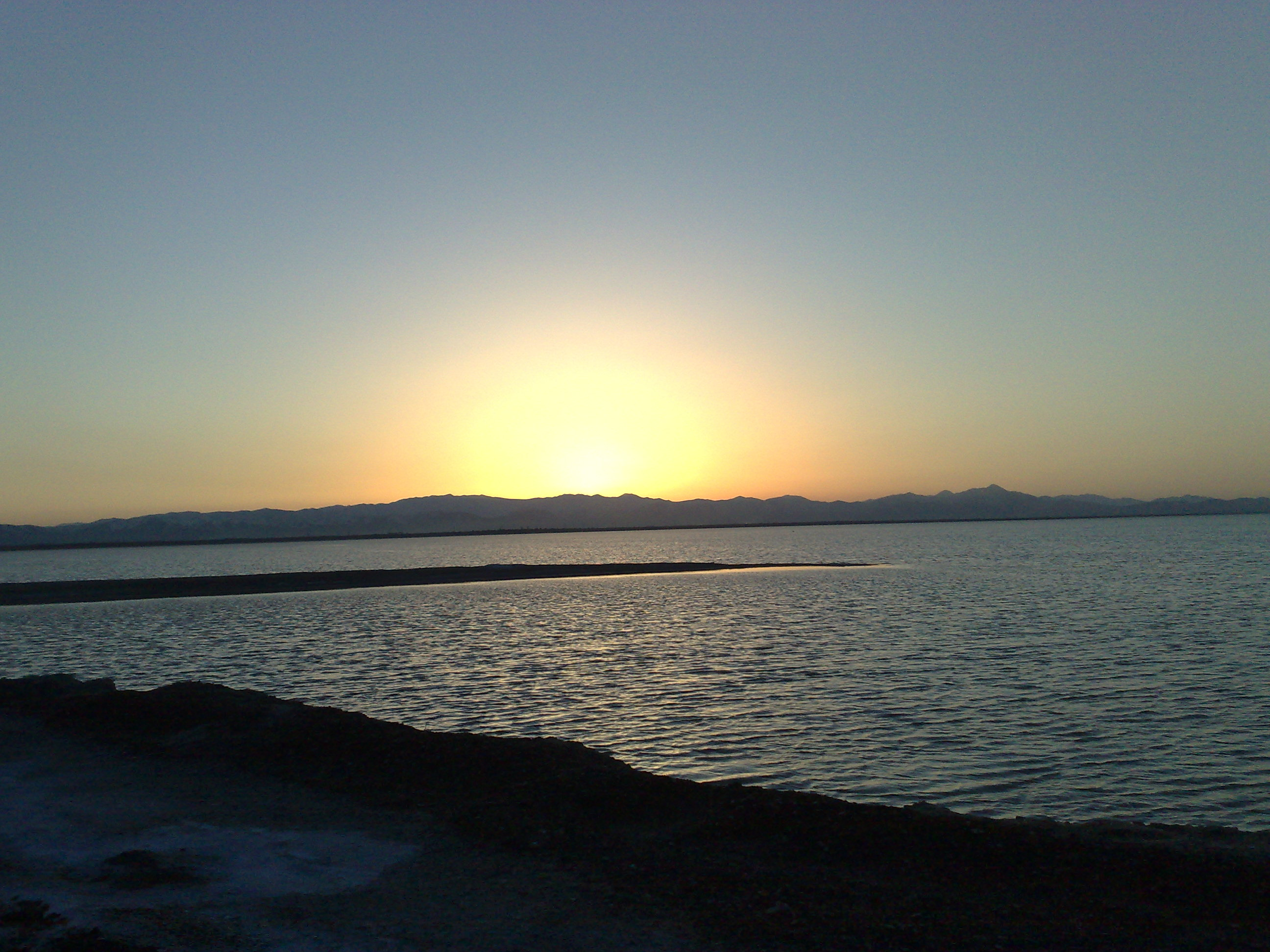 دریاچه است فصلی در شهرستان اراک